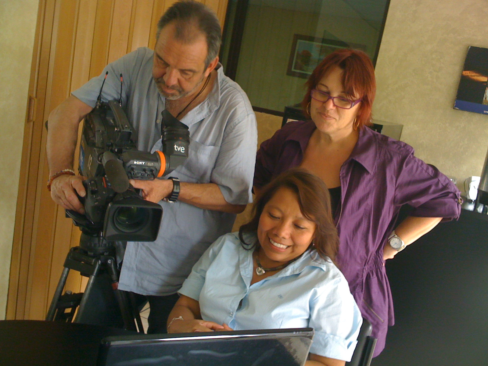 Reportaje sobre la situación de las mujeres. Guatemala 2009